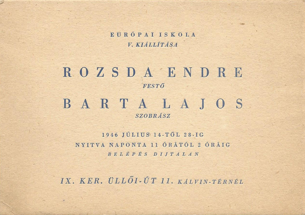 Az Európai Iskola kiállításának meghívója